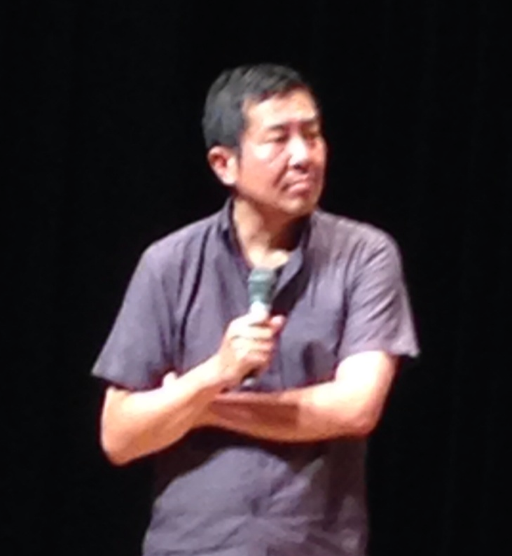 茨城県大子町での『天心』上映会にて